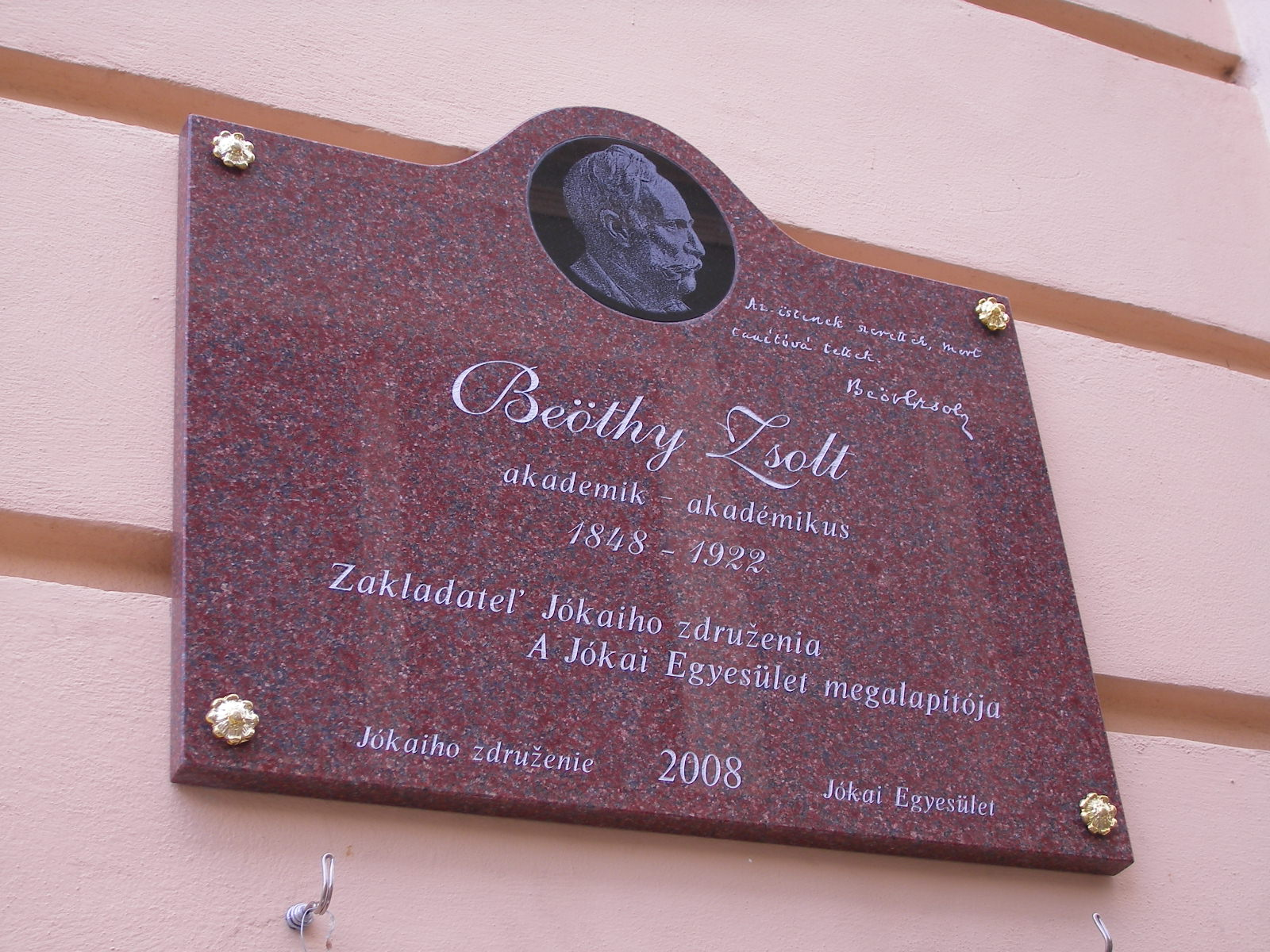 Komárom - Beöthy Zsolt akadémikus emléktáblája a Duna Menti Múzeum épületének falán